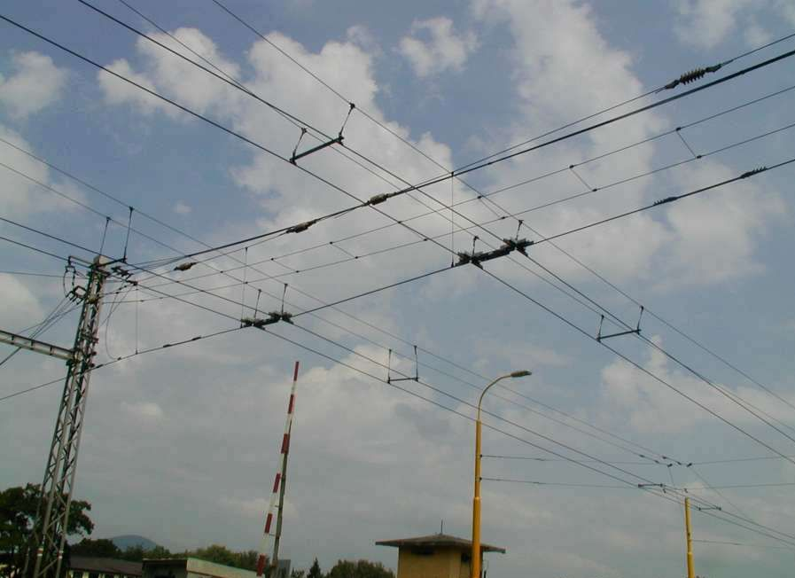 Styk trolejbusové a vlakové trakce